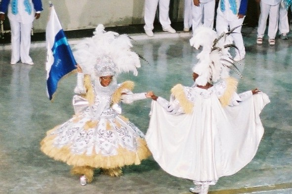 Défilé des écoles du groupe spécial au sambodrome lors du carnaval de Rio 2004 La porte-drapeau et le mestre-sala de l'école Portela Photographie prise par utilisateur:Clem Cousi Utilisateur:Clem Cousi